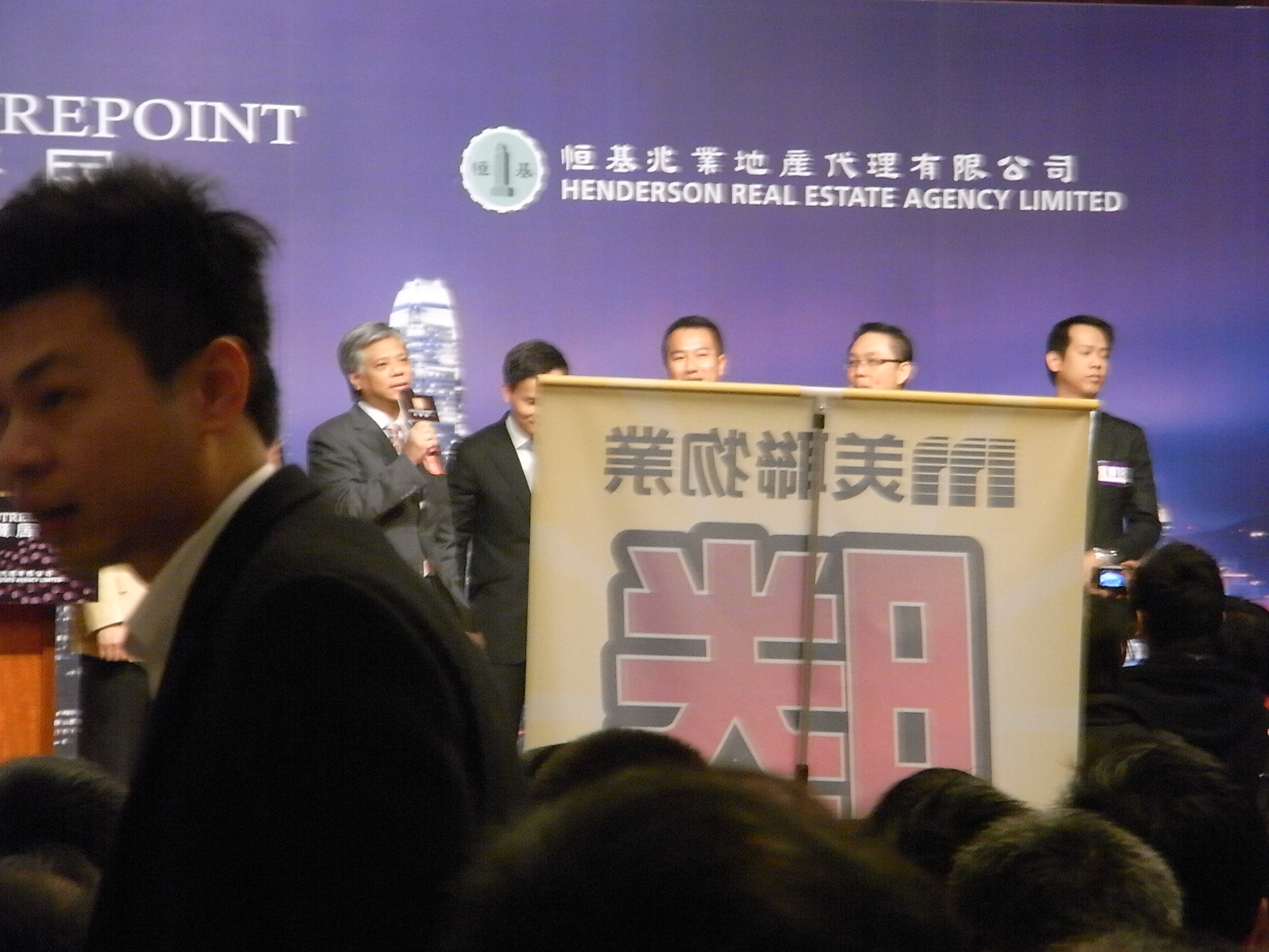 中文（香港）: 尚賢居 誓師大會